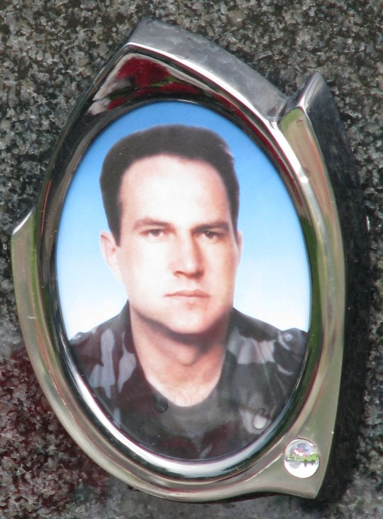 Fotografija Marka Babića, vukovarskog branitelja na nadgrobnoj ploči na vukovarskom novom groblju